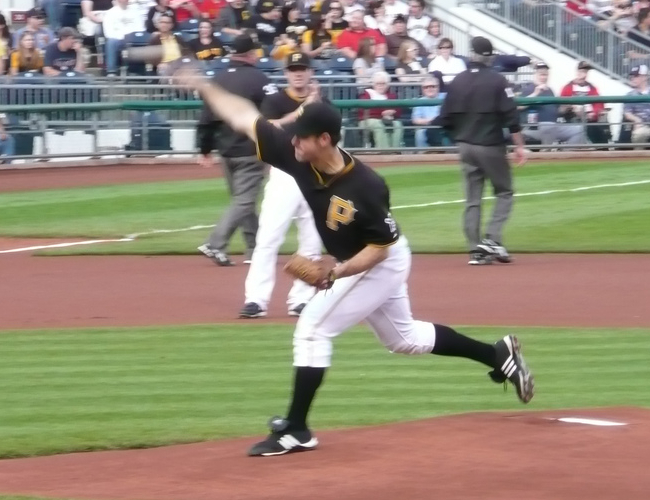 Ross Ohlendorf